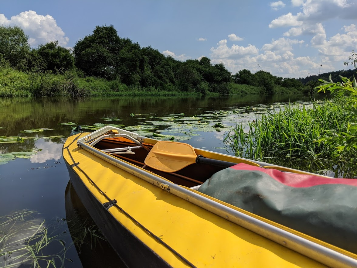 «Горинські крутосхили», Ківерцівський р-н, ДП «Цуманське ЛГ», Горинське л-во: кв. 39, вид. 24, 26, 27, 30, 32, 33, 37, 40, 41, 46, 47